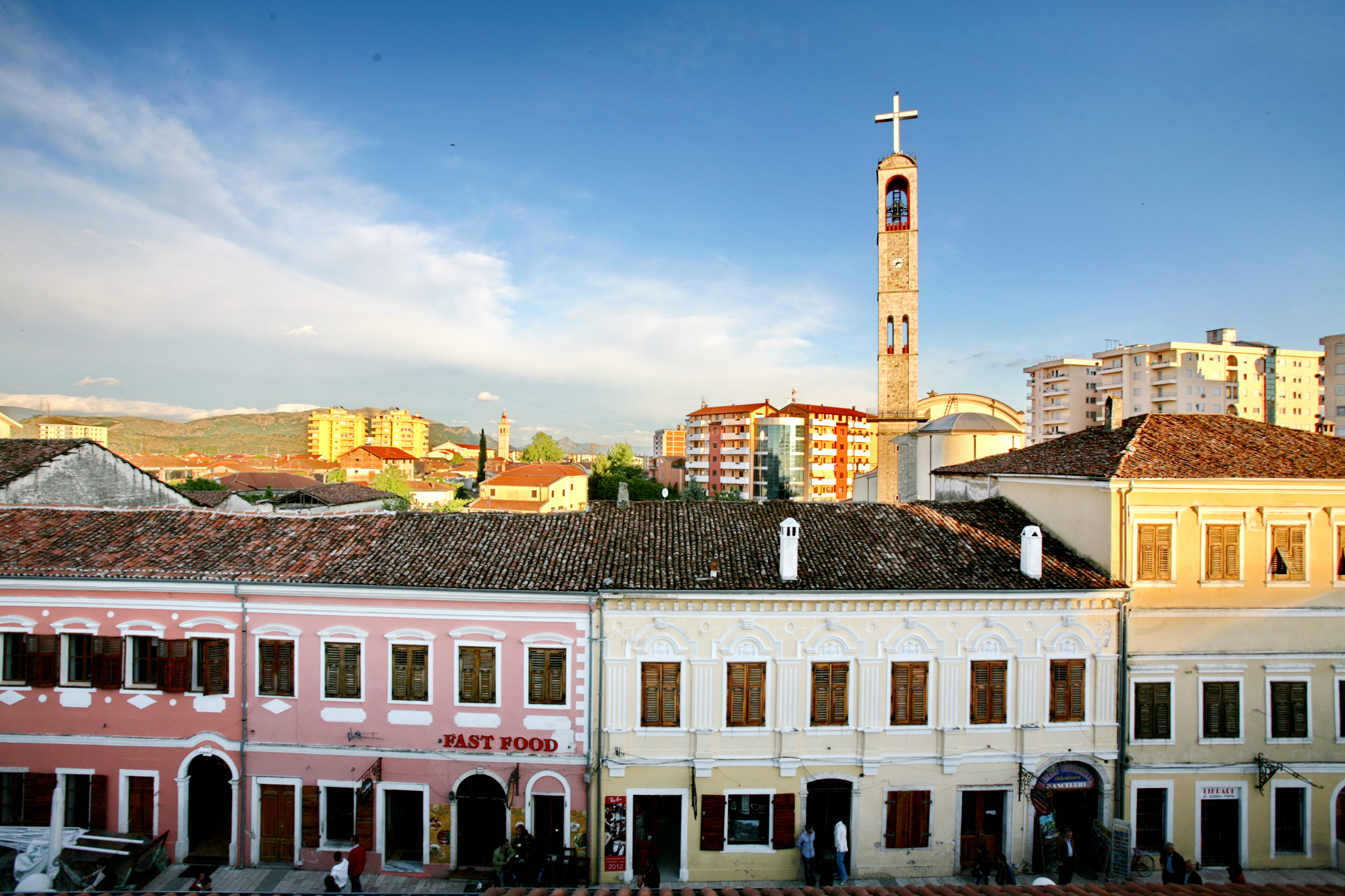 Në Shkodër